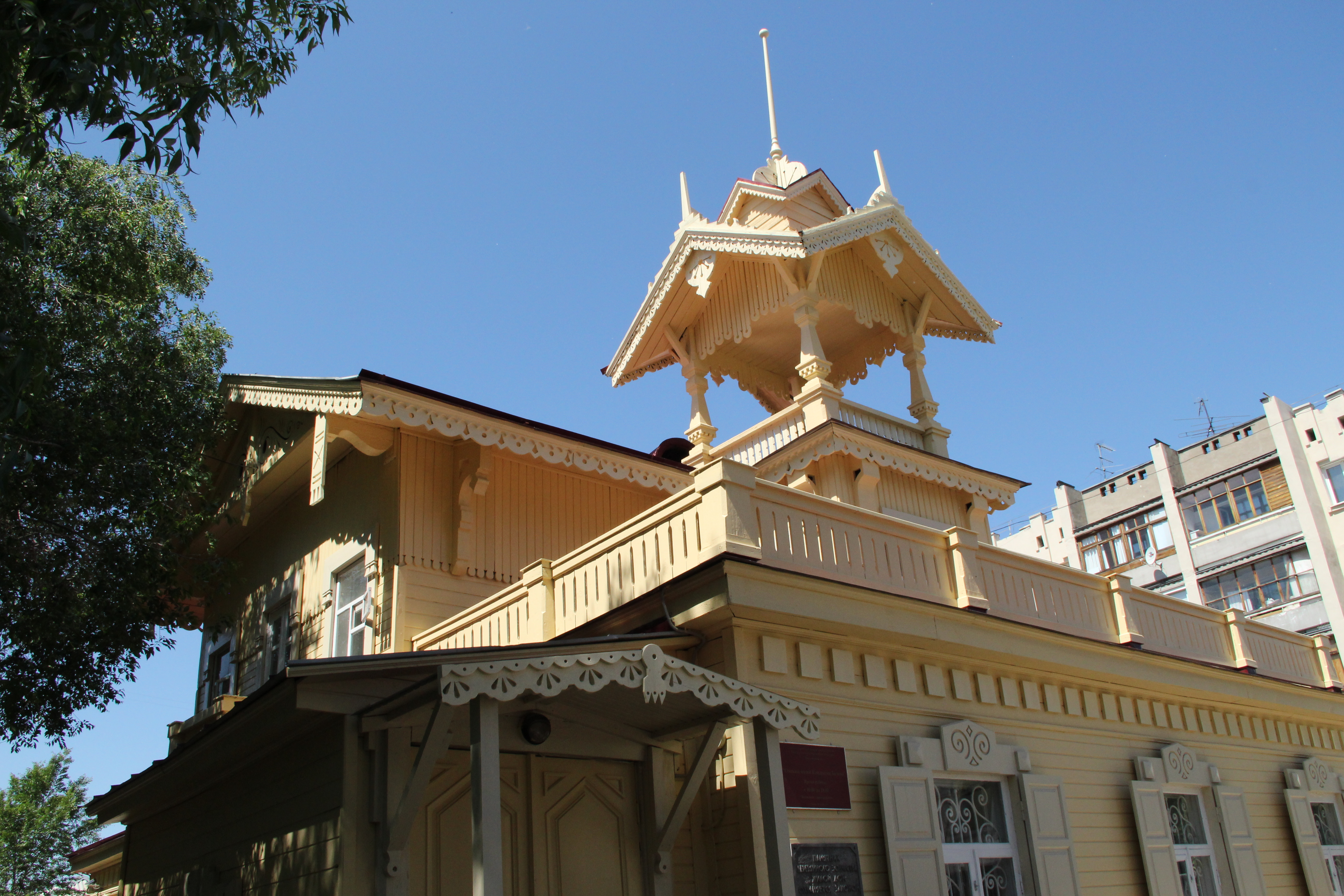 Дом Ф. Ф. Штумпфа (Омская область, Омск, Ч. Валиханова улица, 10)